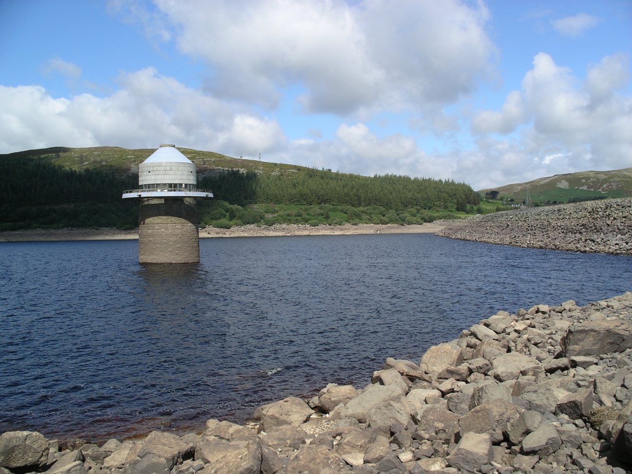 Llyn Celyn showing dam and take-off tower